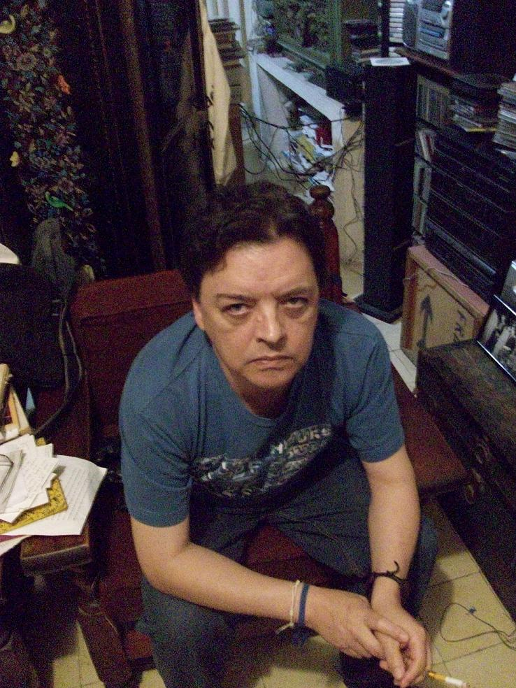 La fotografía fue tomada por Luis Miguel Bernal en noviembre de 2009. Luis Zapata nombró este archivo como: "Tocayitos Nov. 2009 003.jpg"